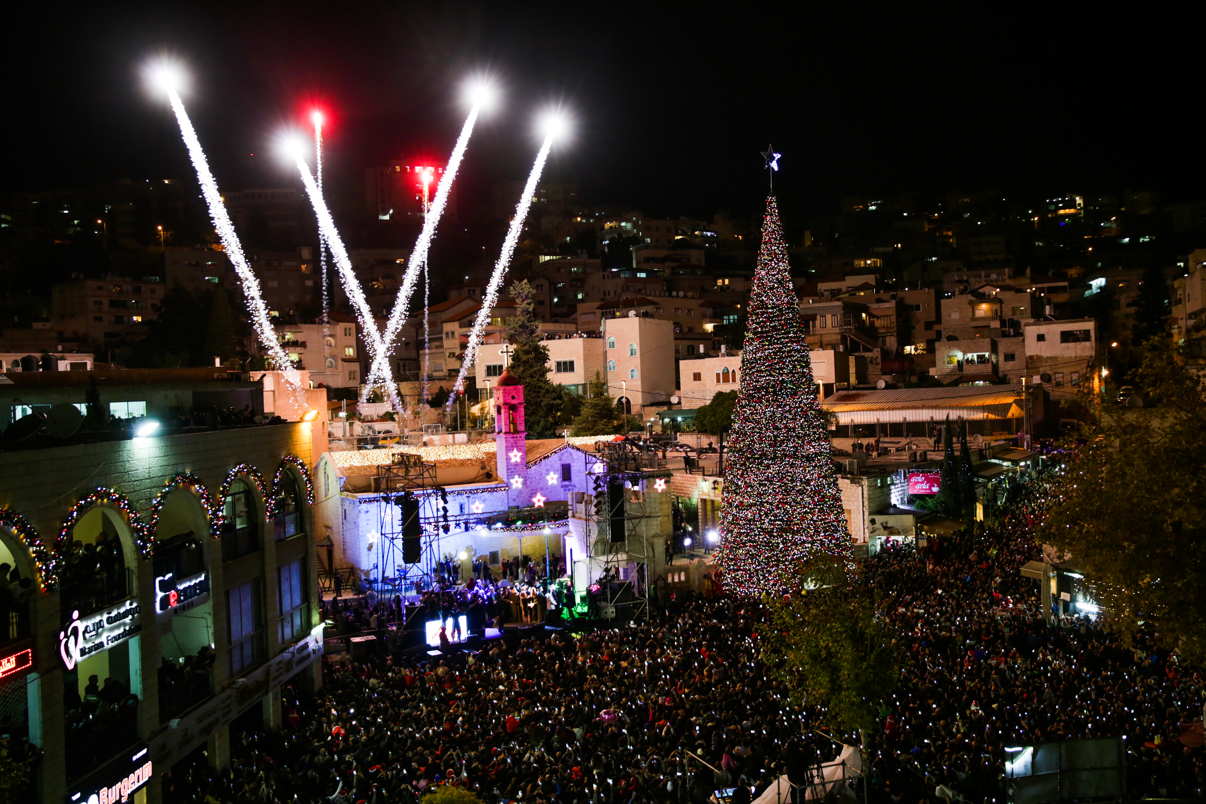 הארת עץ חג המולד הגדול ביותר במזרח התיכון בעיר נצרת